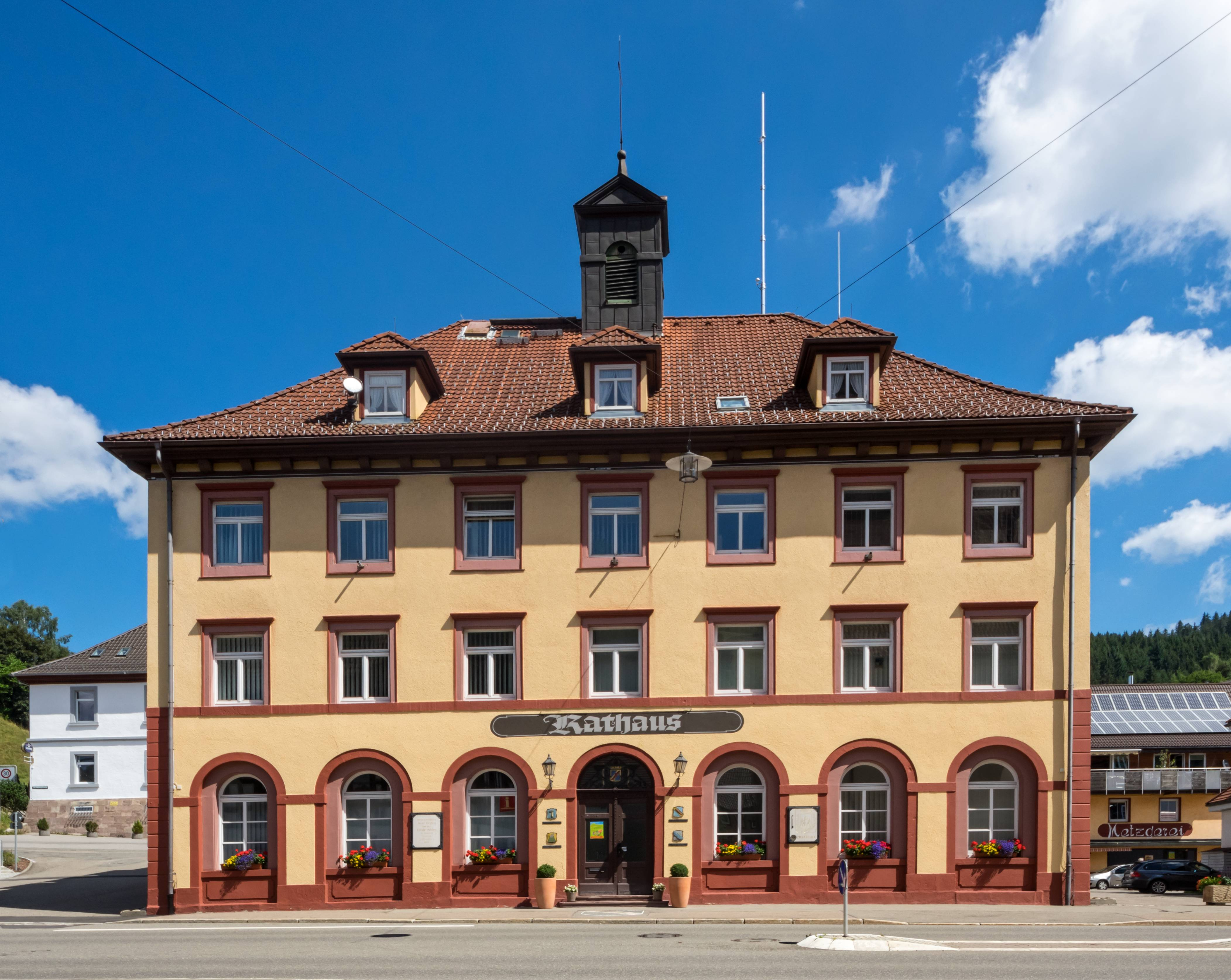 Bilder aus Vöhrenbach